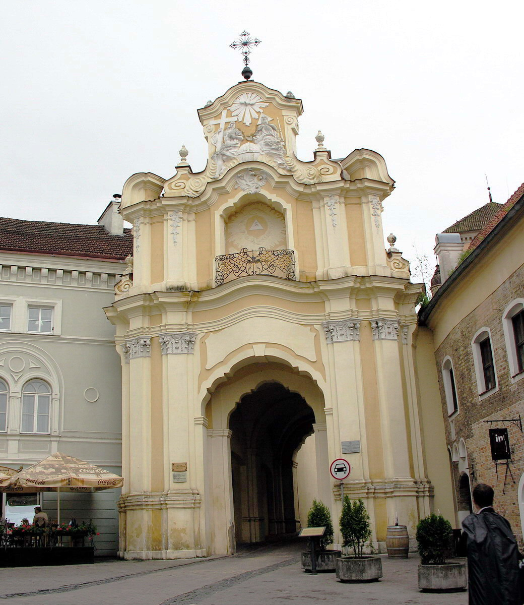 Vilnius Švč. Trejybės bazilijonų vienuolynas Foto: Algirdas, 2006 m. rugpjūčio 8 d., Lietuva